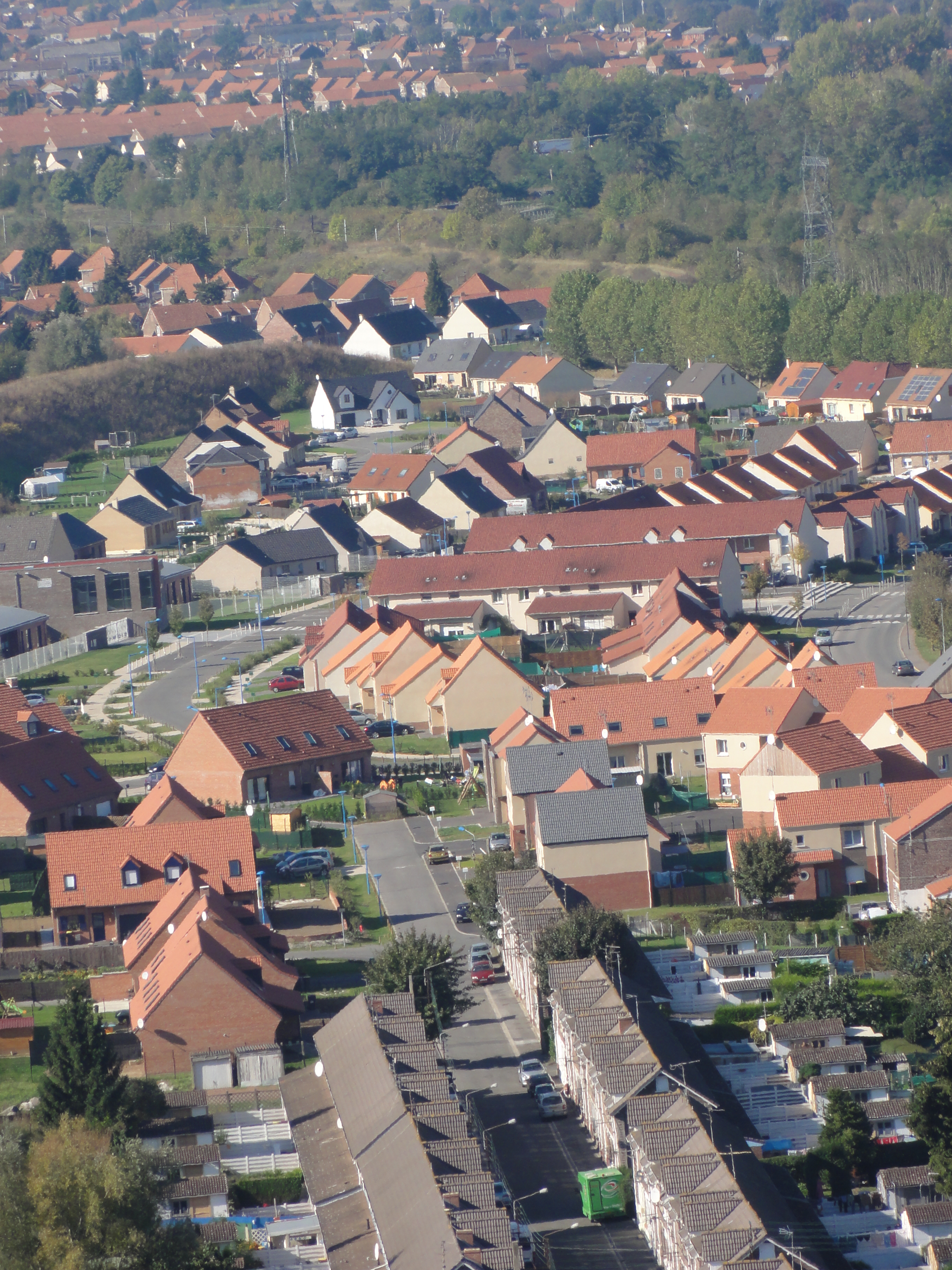 Terril n° 104A dit 10 Sud de Courrières nord, disparu, fosse n° 10 - 20 de la Compagnie des mines de Courrières dans le bassin minier du Nord-Pas-de-Calais, Billy-Montigny, Pas-de-Calais, Nord-Pas-de-Calais, France.